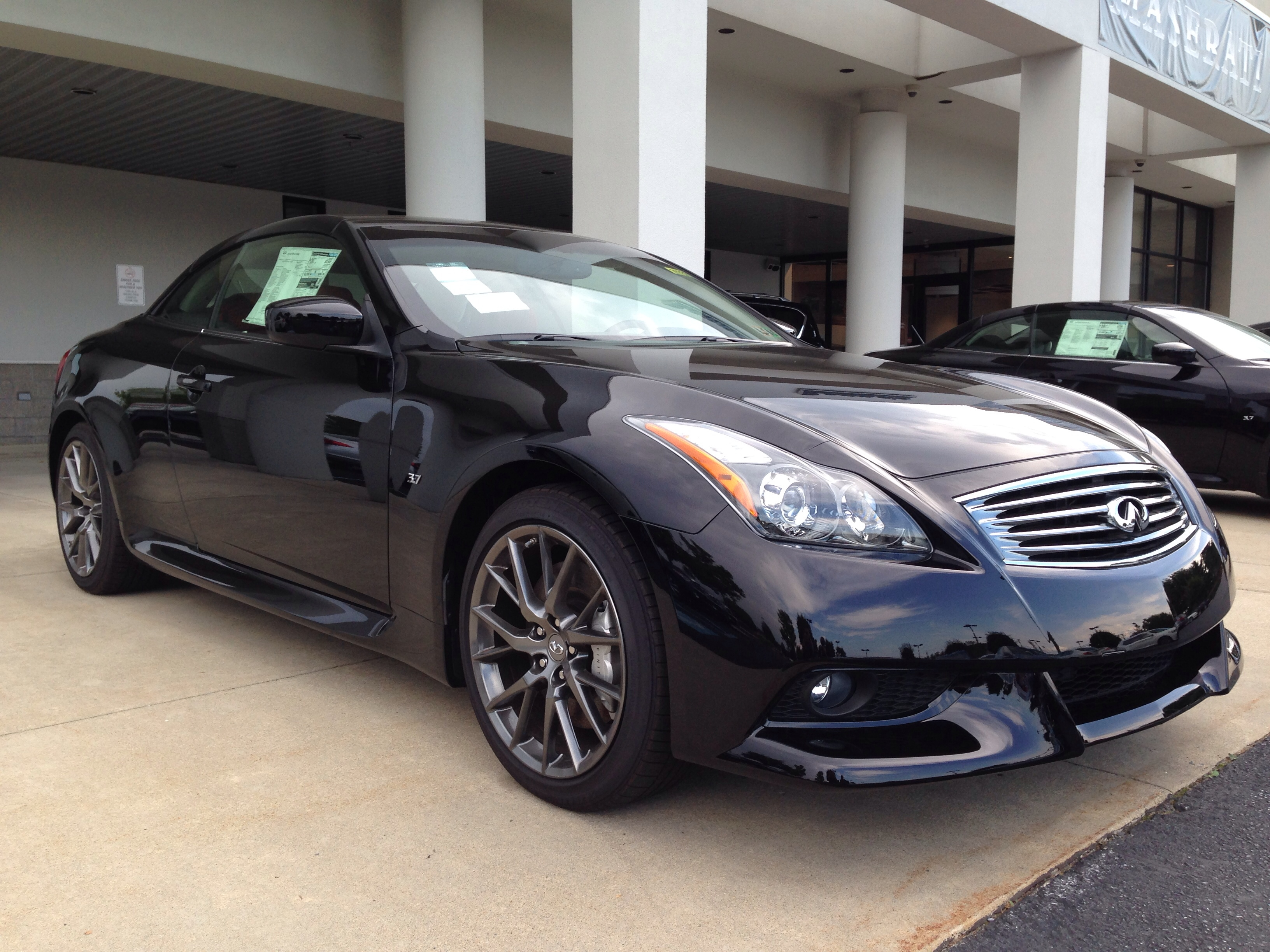 Infiniti Q60 IPL Convertible